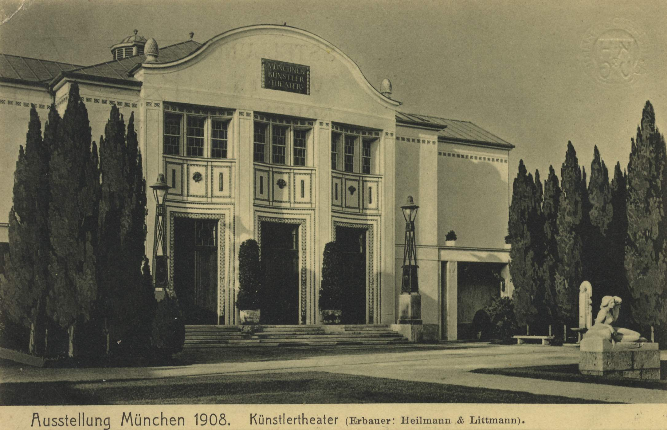 Ausstellung München 1908: Künstlertheater (Erbauer Heilmann & Littmann)